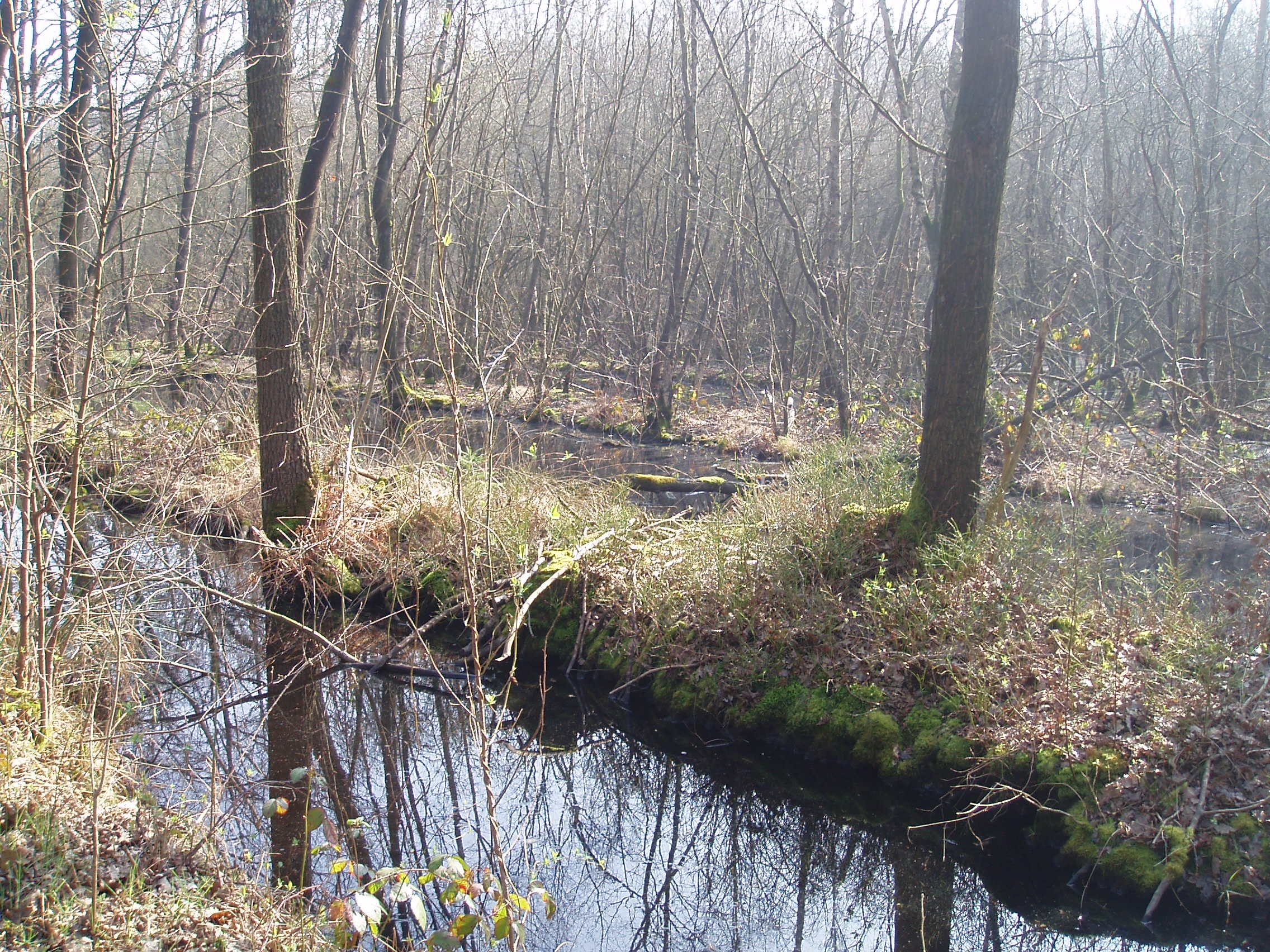 Natuurgebied Het Goor-Asbroek te Westmeerbeek (Hulshout)